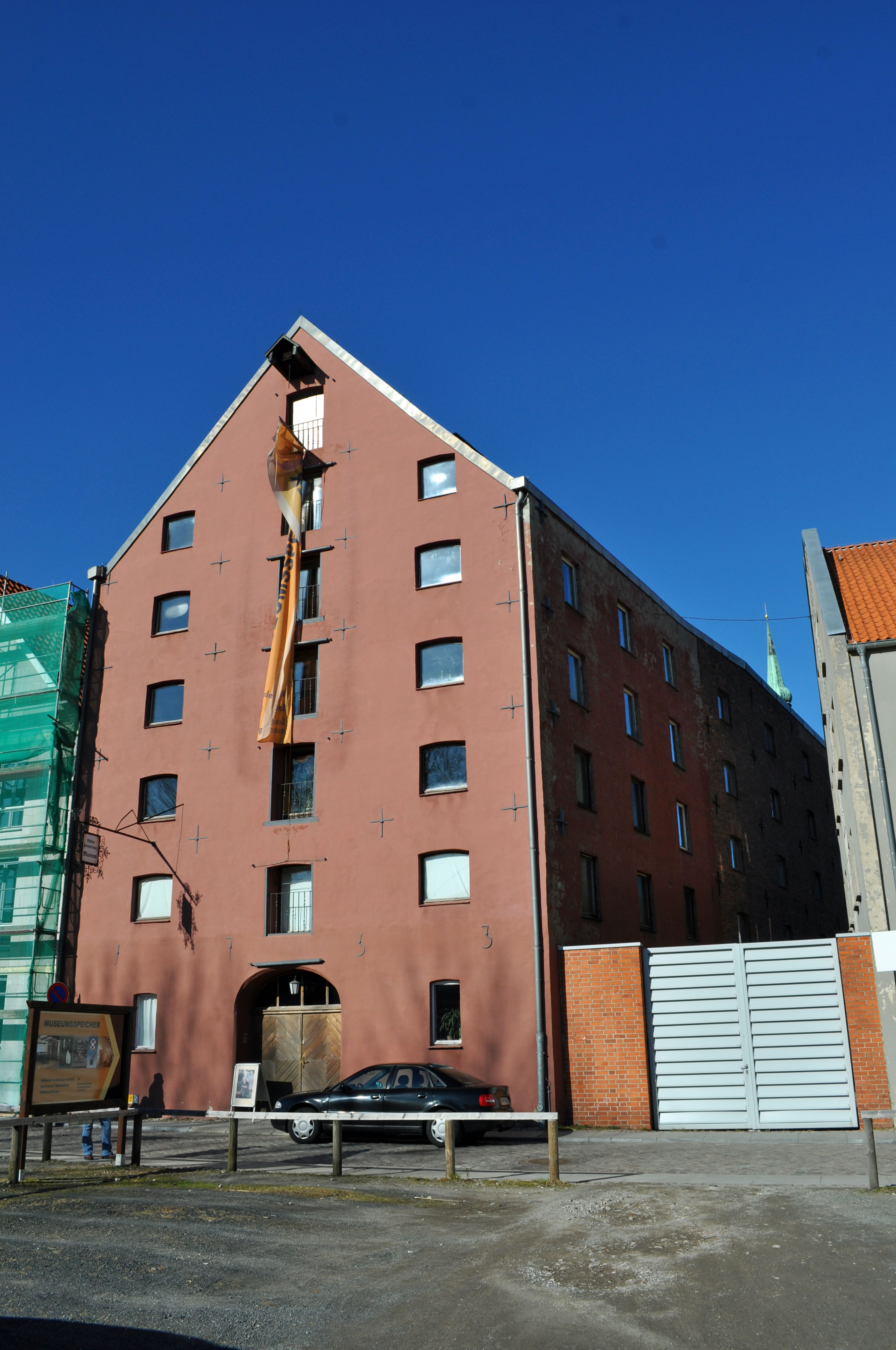 Gebäude bzw. Gebäudedetail in Stralsund. Straße und Hausnummer siehe Dateiname. Museumsspeicher. Das Gebäude ist als Baudenkmal ausgewiesen, siehe dazu die Liste der Baudenkmale in Stralsund.